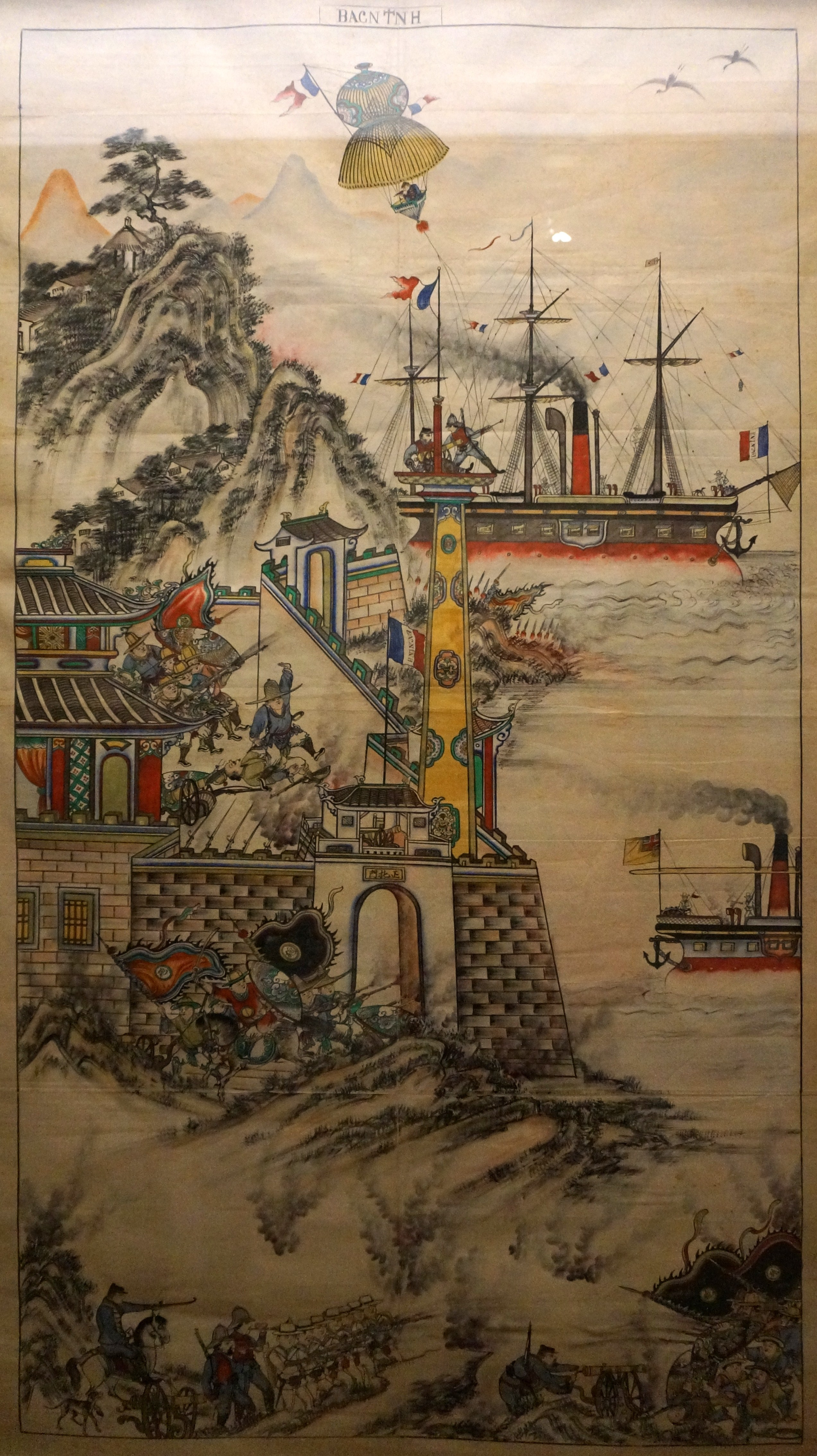 Présenté lors de l'exposition Indochine des territoires et des hommes 1856 1956 . Soie peinte don de Dauriac au Musée de l'armée.